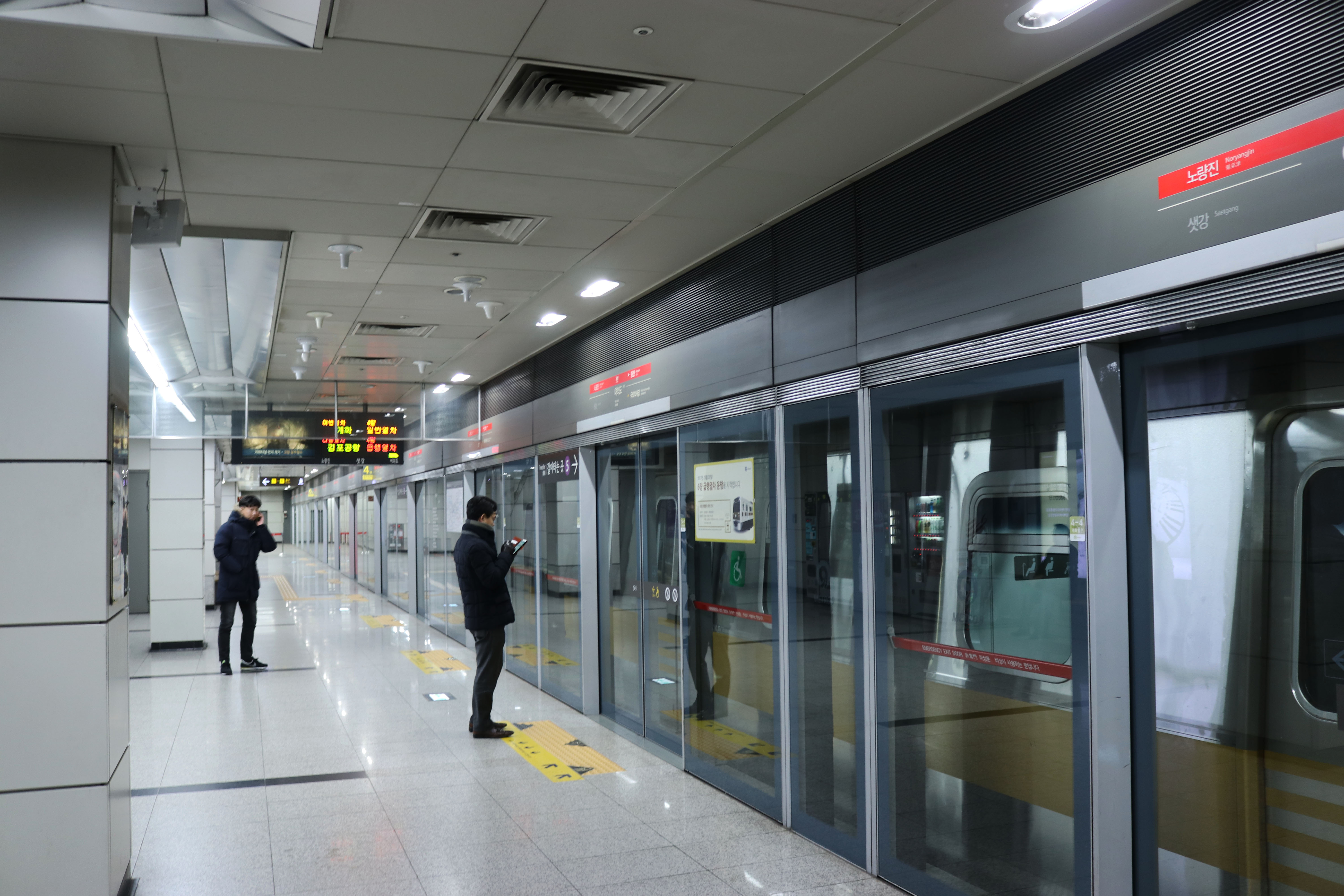 9호선 여의도역 승강장